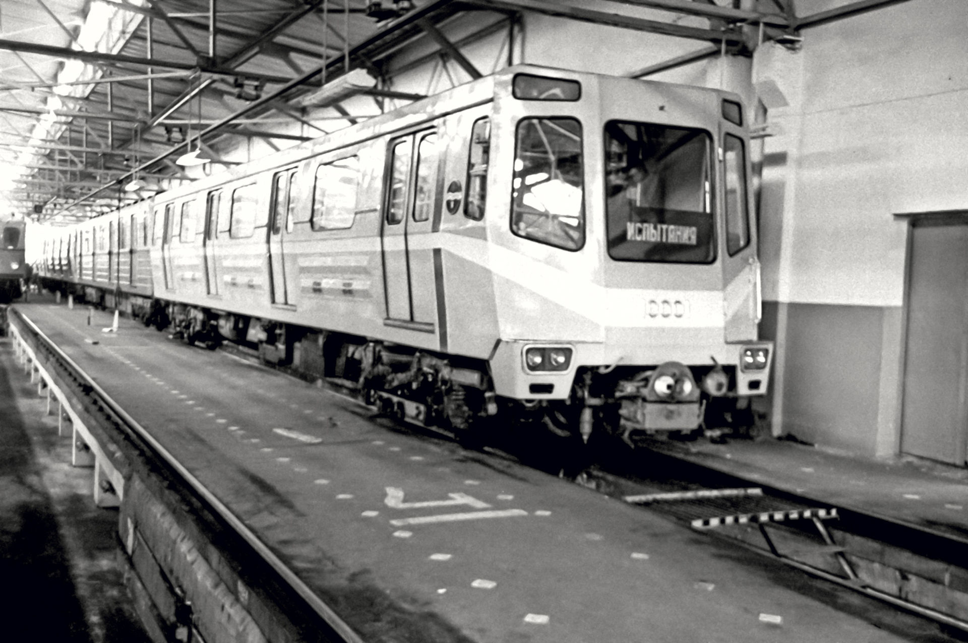 Электровагон метро И № 10001 совместно с другими вагонами Е в депо